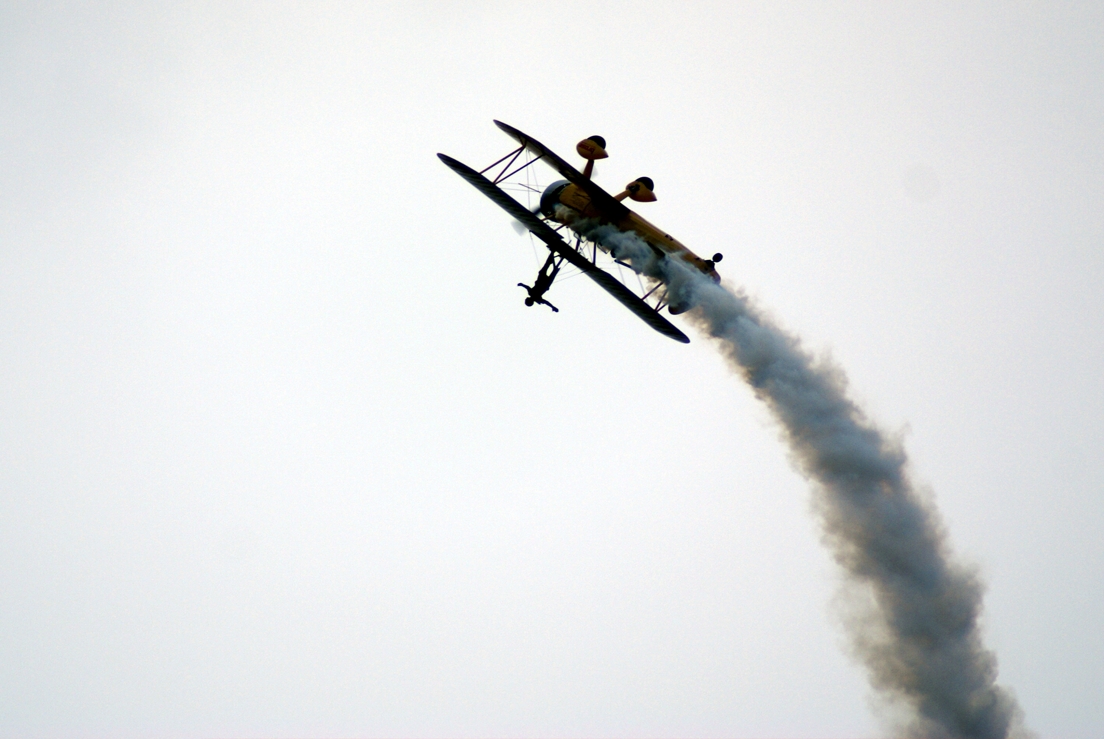 Airwalking:Besonderer Kunstflug